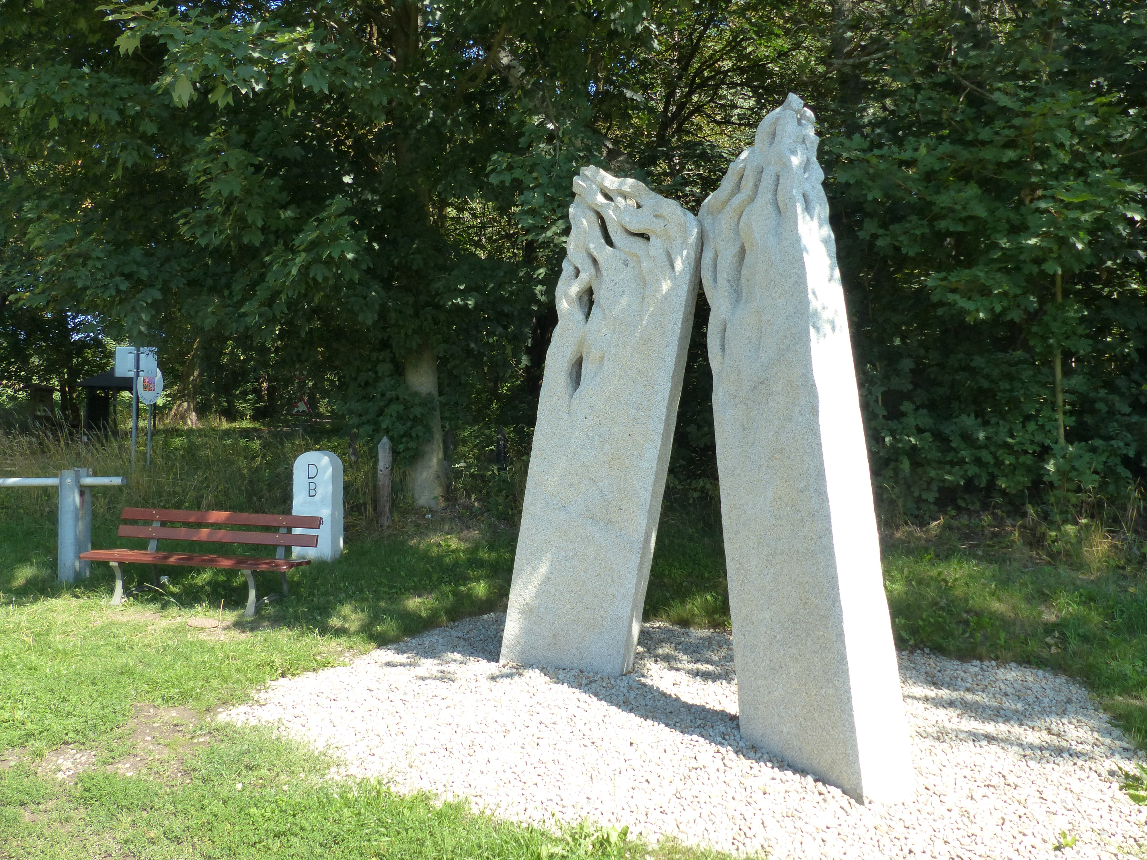 Neuhausen, Ortsteil von Rehau und Grenzgebiet